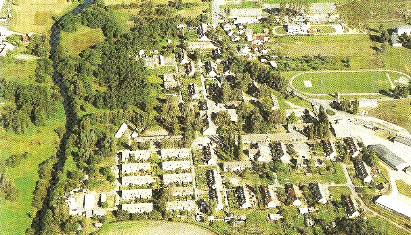 Siedlung in der Karl- Marx- Strasse aus den 1930er Jahren.